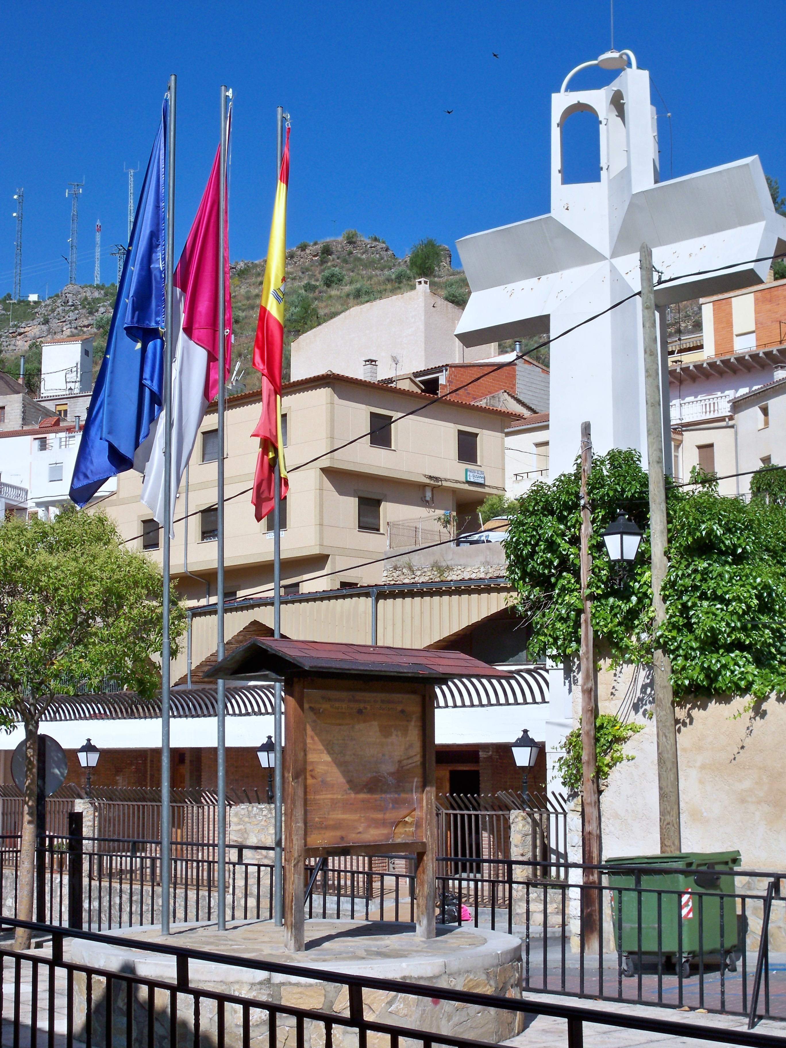 Cartel con mapa de todas las rutas de senderismo del municipio de Molinicos (Albacete)